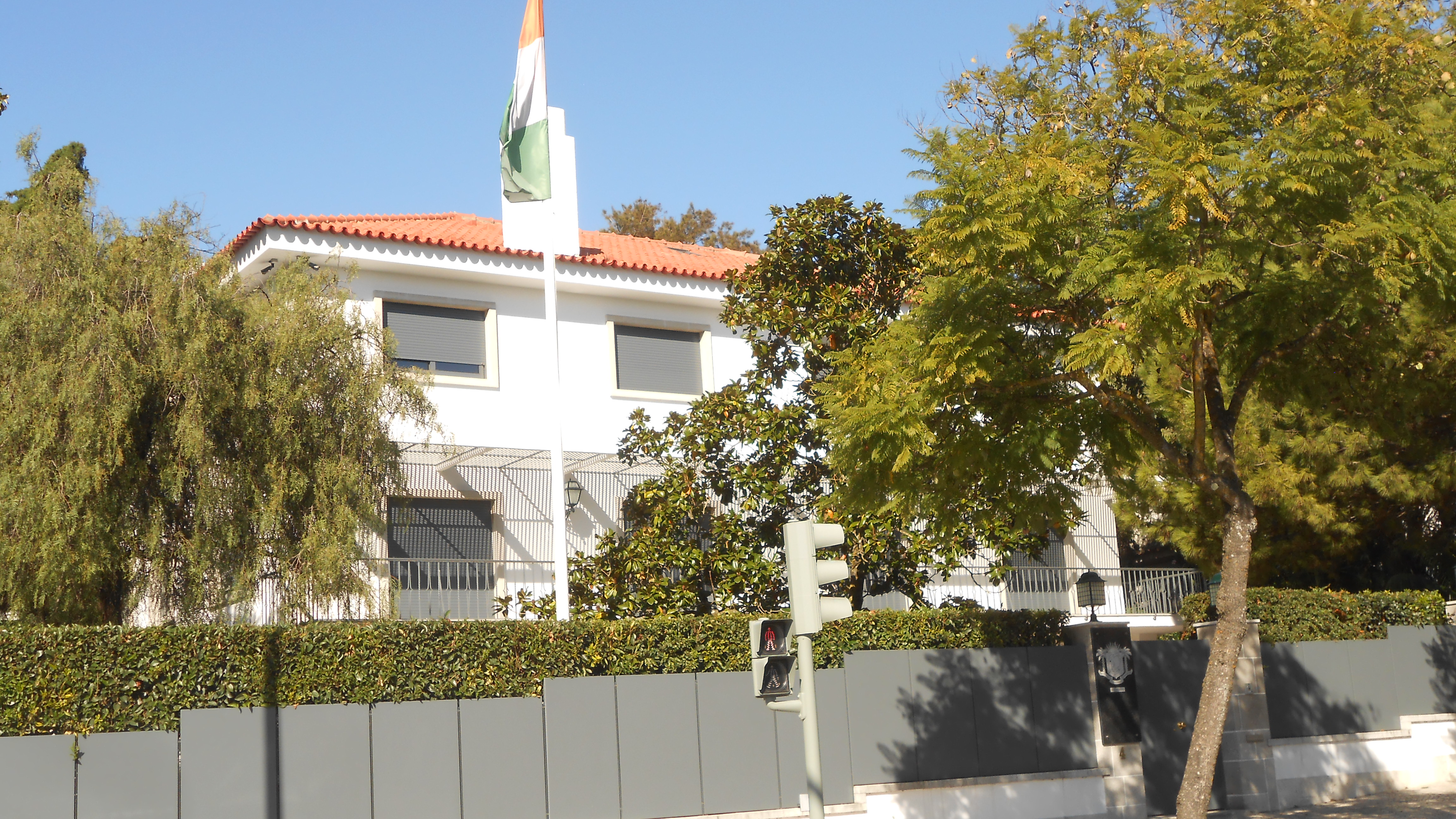 A embaixada da Costa de Marfim em Belém.